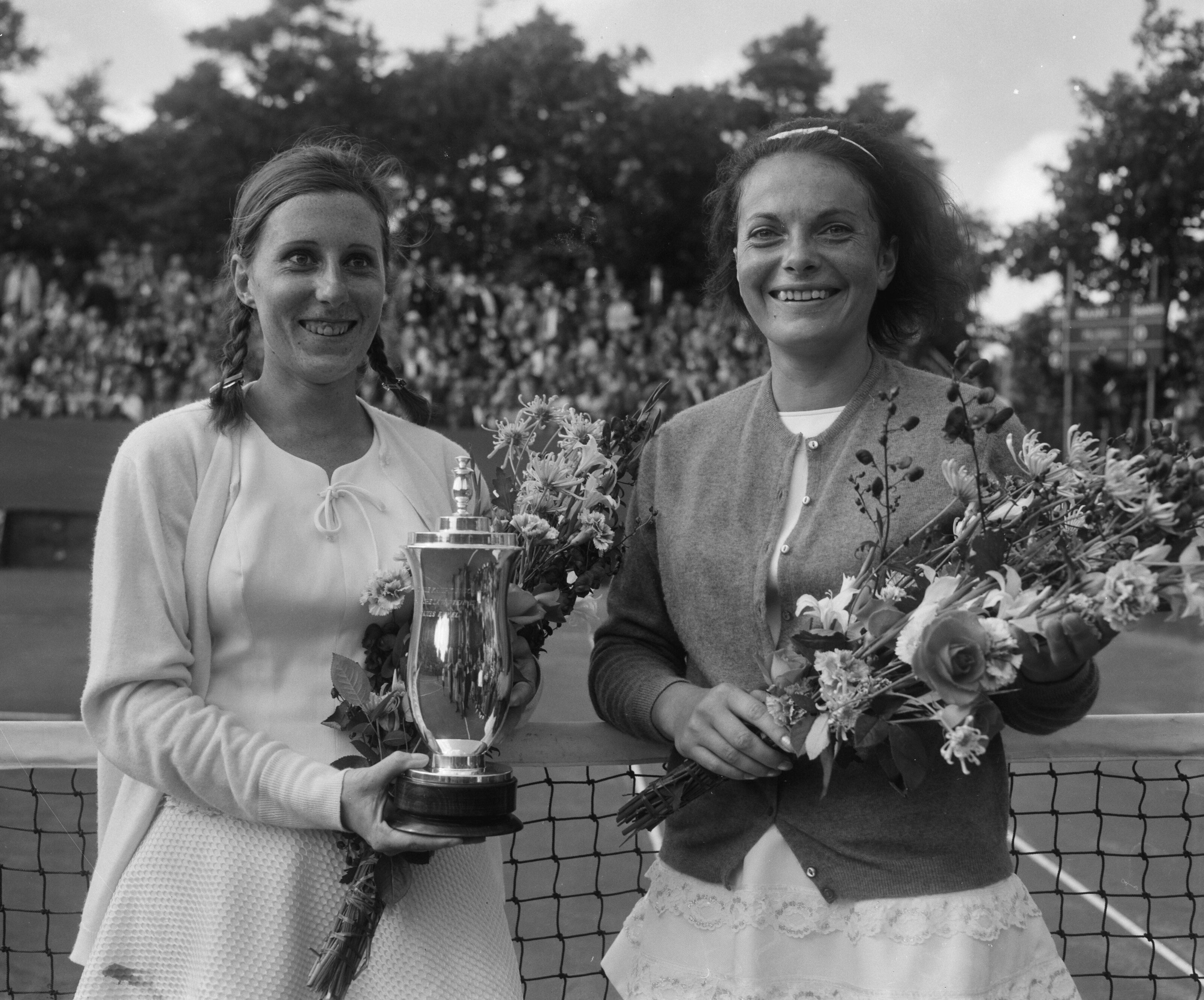 Collectie / Archief : Fotocollectie Anefo Reportage / Serie : [ onbekend ] Beschrijving : Tennis te Hilversum, dames enkelspel links mejuffrouw F. Durr (Frankrijk) met beker, rechts mejuffrouw E. Buding (Duitsland) Datum : 25 juli 1965 Locatie : Duitsland, Frankrijk, Hilversum Trefwoorden : TENNIS, bekers Persoonsnaam : E. Buding, F. Durr Fotograaf : Bilsen, Joop van / Anefo Auteursrechthebbende : Nationaal Archief Materiaalsoort : Negatief (zwart/wit) Nummer archiefinventaris : bekijk toegang 2.24.01.04 Bestanddeelnummer : 917-9965